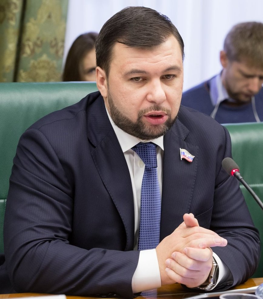 Денис Владимирович Пушилин (род. 1981) — государственный деятель непризнанной Донецкой Народной Республики. Председатель Народного Совета Донецкой Народной Республики